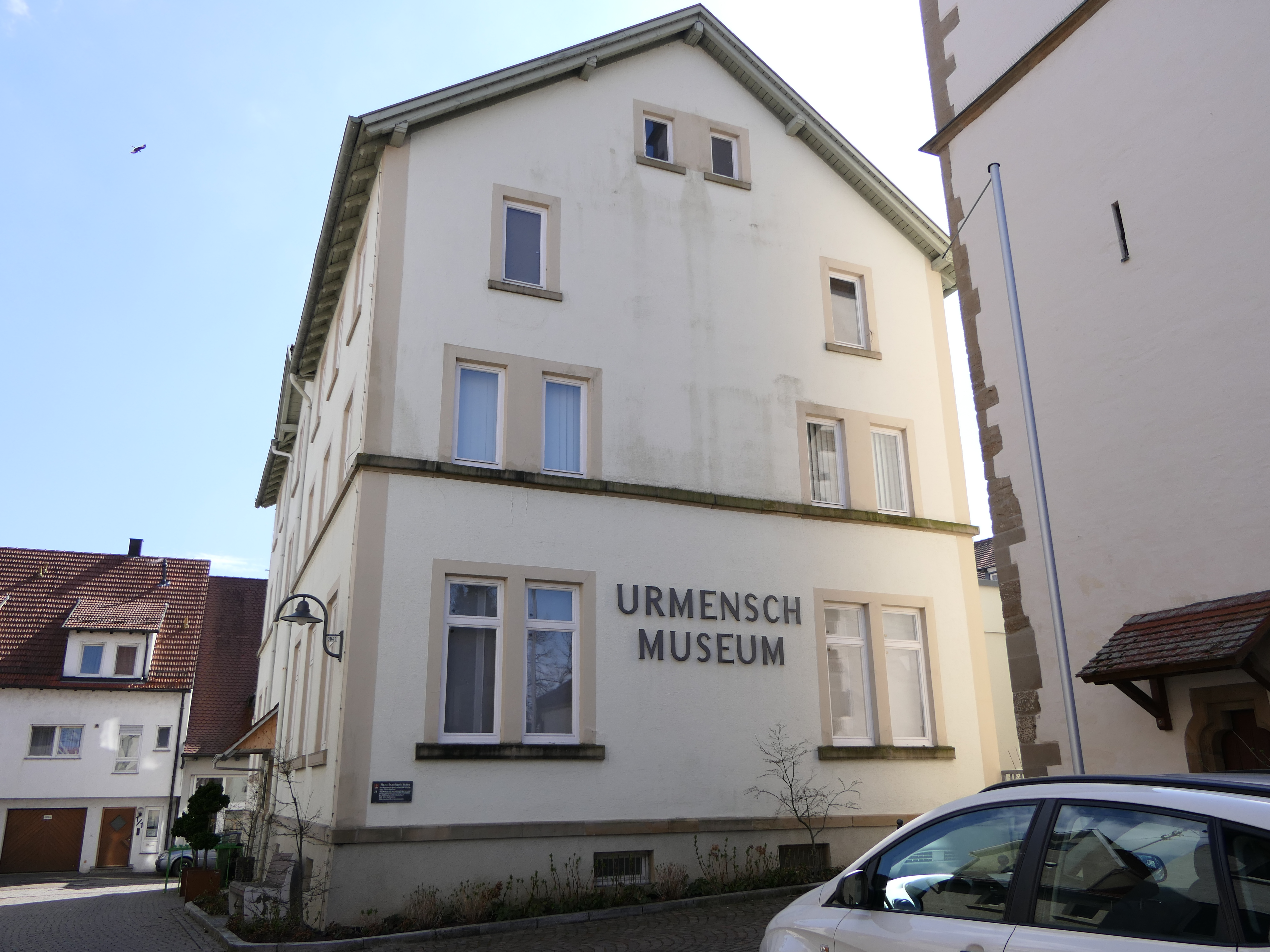 Das Urmensch-Museum im Hans-Trautwein-Haus in Steinheim an der Murr. Westansicht mit Schriftzug.